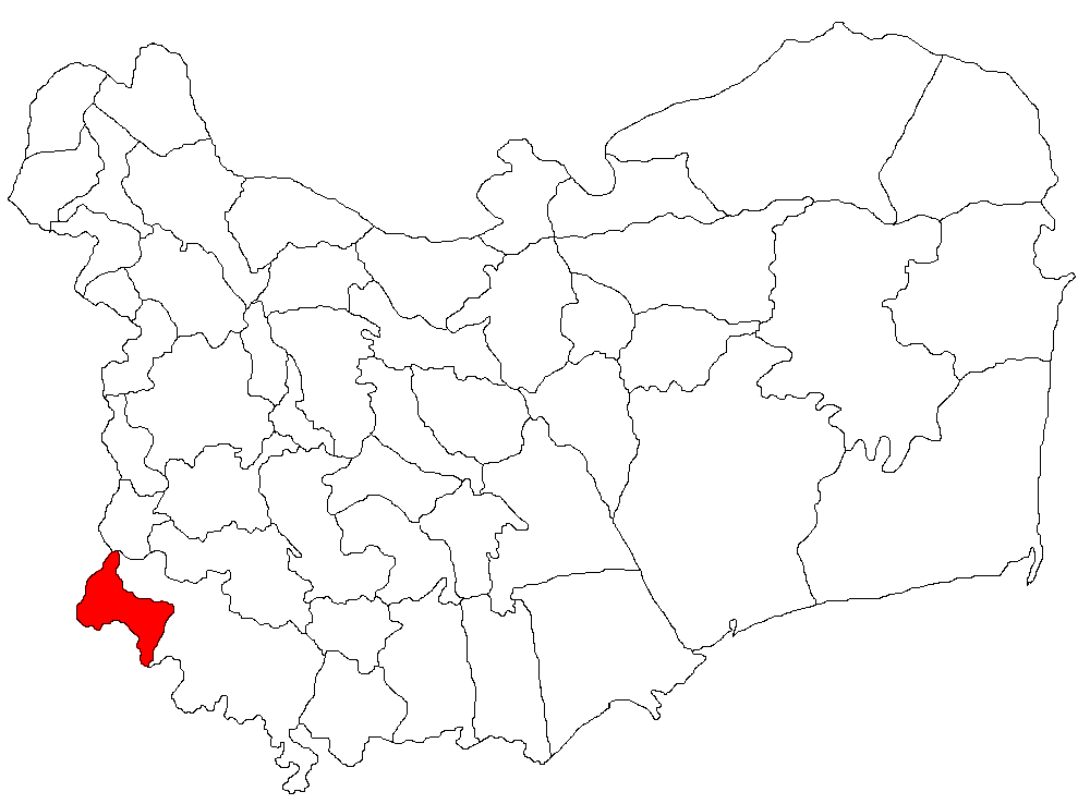 Categorie:Hărţi ale judeţului Tulcea